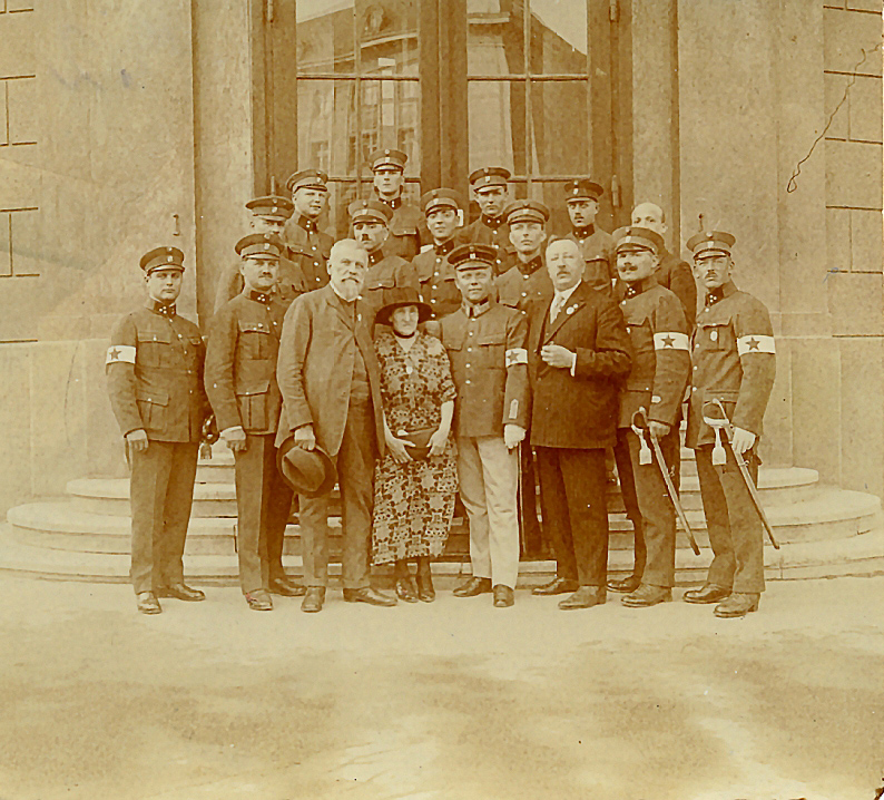 Polizisten mit Esperanto-Schleife, Wien 1924. Gruppenfoto mit Klara Zamenhof, der Witwe des Begründers des Esperanto, anlässlich des 16. Esperanto-Weltkongresses in Wien